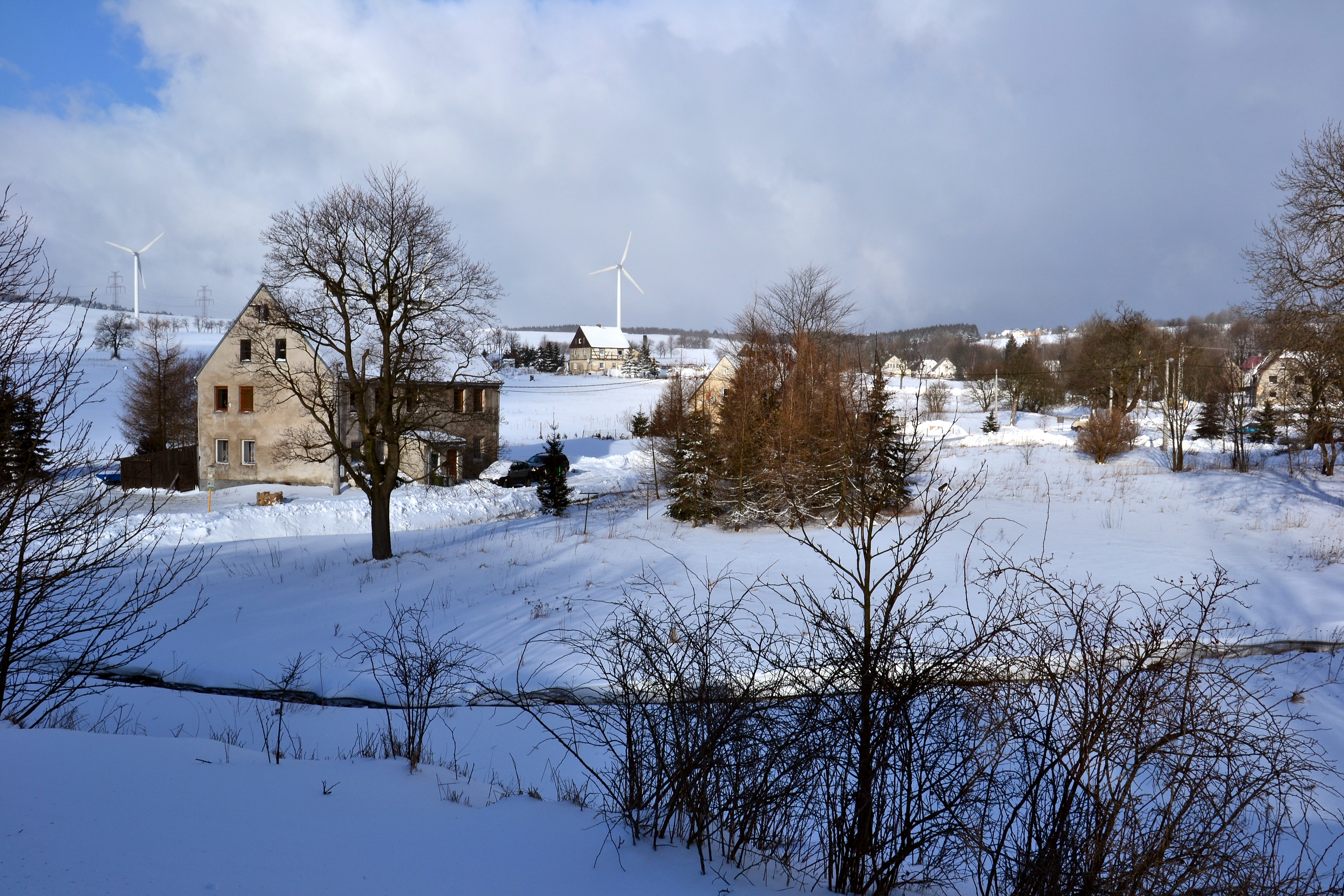 Osamocené usedlosti v západní části vesnice (pohled ze železniční zastávky)